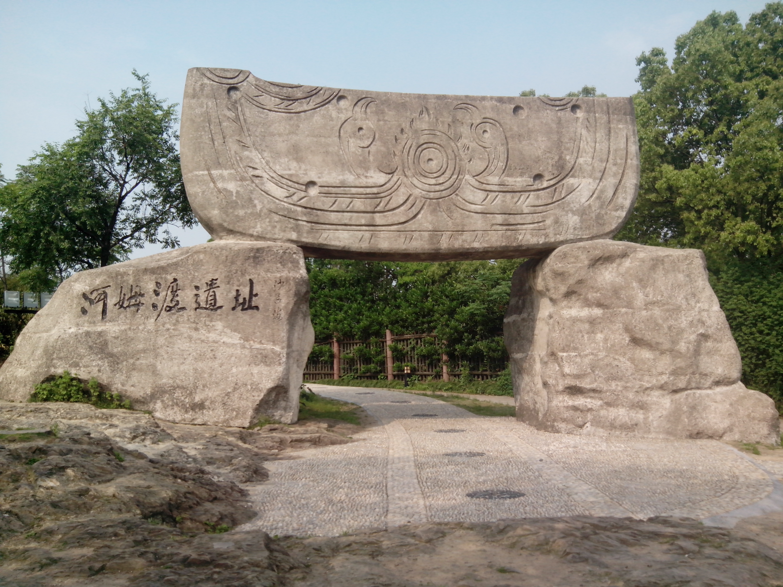 中文（中国大陆）: 国家级 古遗址 宁波市余姚市